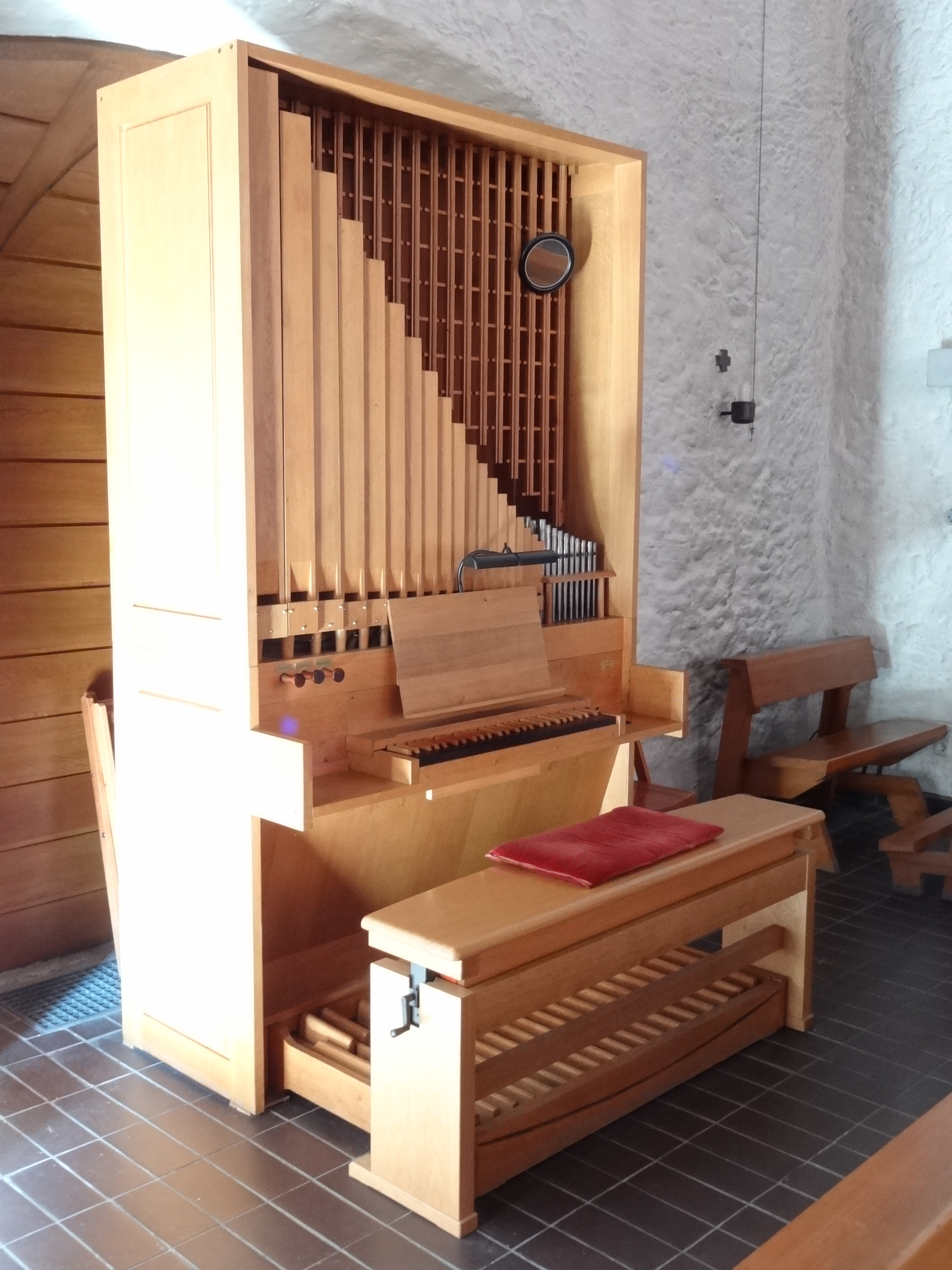 St. Nikolaus (Münzenberg)